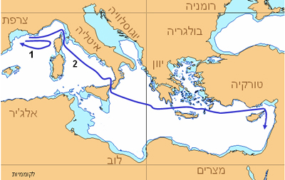 מסלול ההפלגה של אונית המעפילים לקוממיות